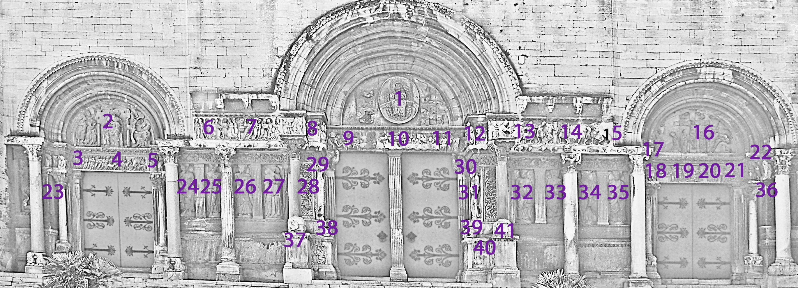 Abteikirche_Saint-Gilles, Portalfassade